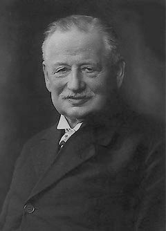 Albert von Ruville (1855-1934), Professor der Geschichte an der Universität Halle, Konvertit zur katholischen Kirche